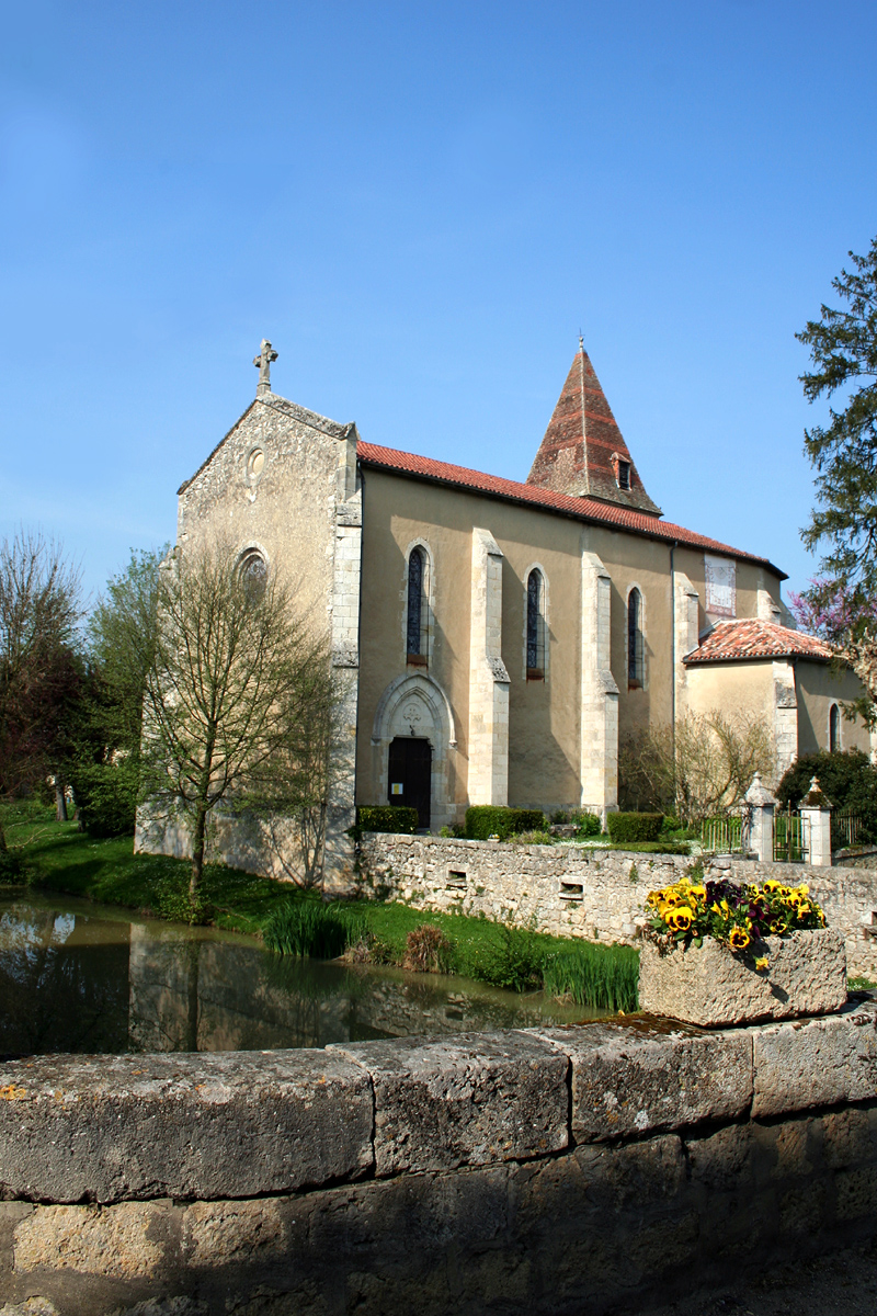 village of Fourcès, Gers (France). Saint-Laurent church. Église Saint-Laurent.